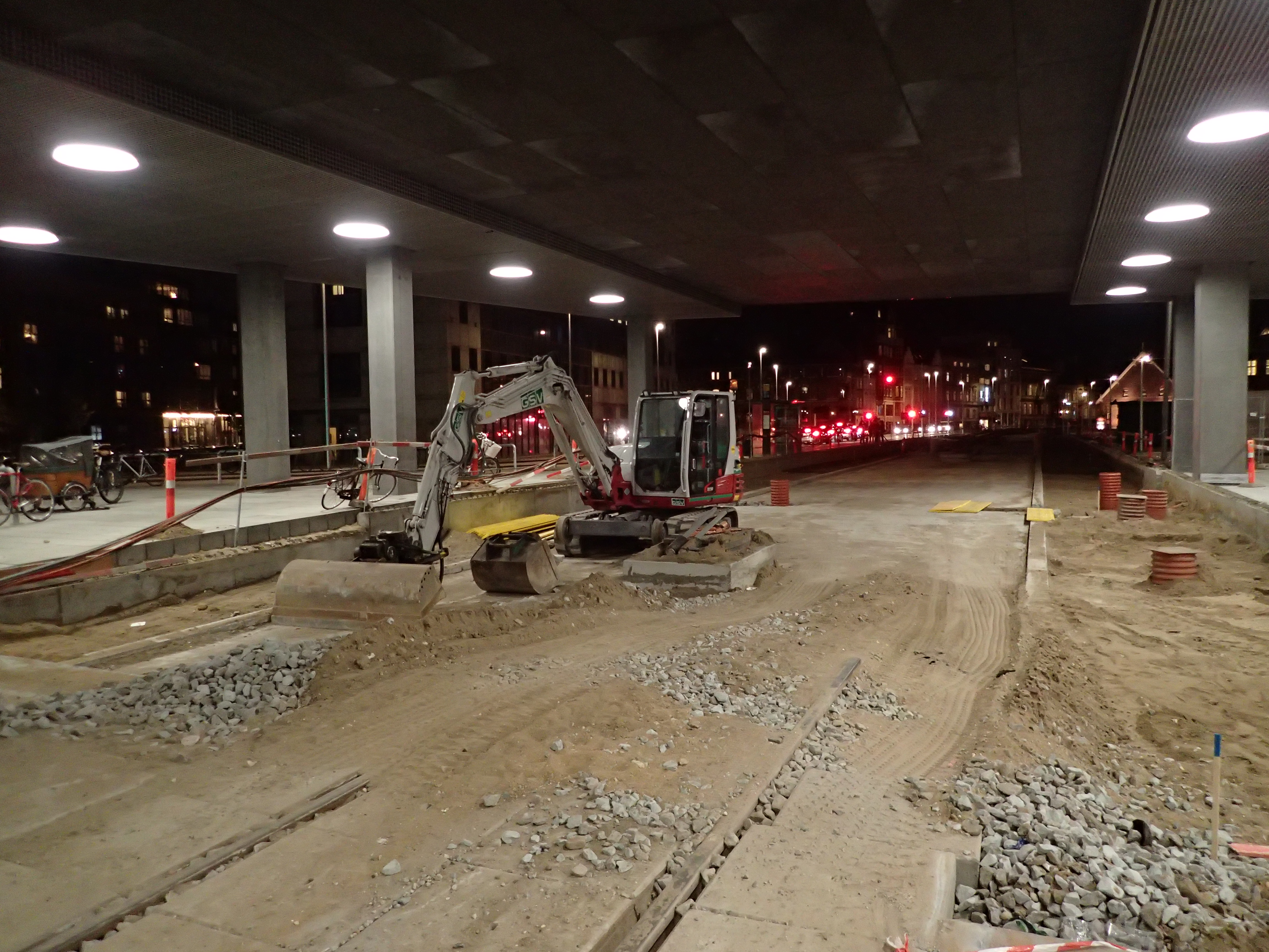 Anlægsarbejde for Letbanen under Dokk1.